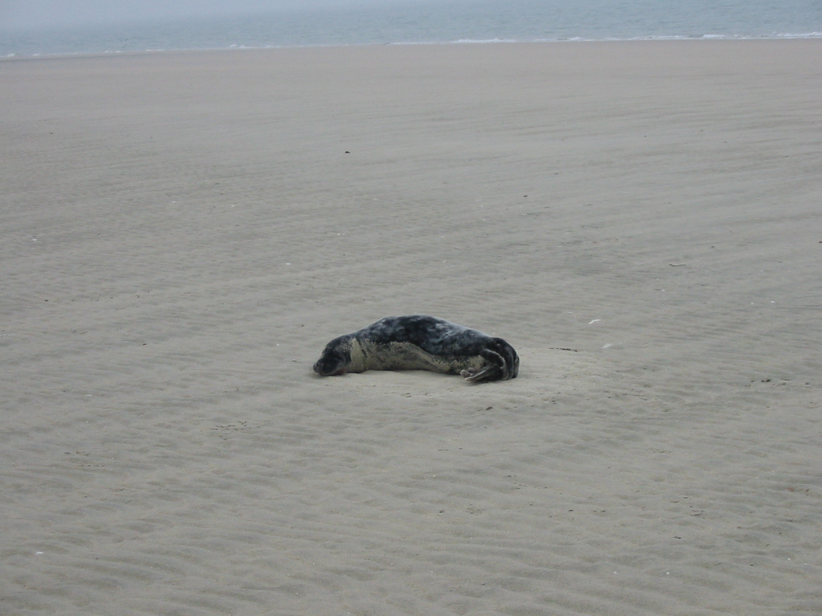 Een huiler, jonge grijze zeehond (young grey seal) op het Verklikkerstrand bij Renesse in Zeeland. Aangetroffen op 30 maart 2007. Het jong is opgehaald door de zeehondencreche en zal als het volwassen wordt hetzij de naam Elly krijgen, hetzij de naam Julian. Het diertje is geboren in december 2006. Op 30 maart 2007 woog het 15 kilo. Een dier van deze leeftijd hoort echter 50 kilo te wegen.